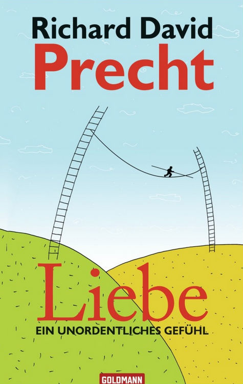 Richard David Precht: Liebe - Ein unordentliches Gefühl. Goldmann Verlag, München 2009. DNB